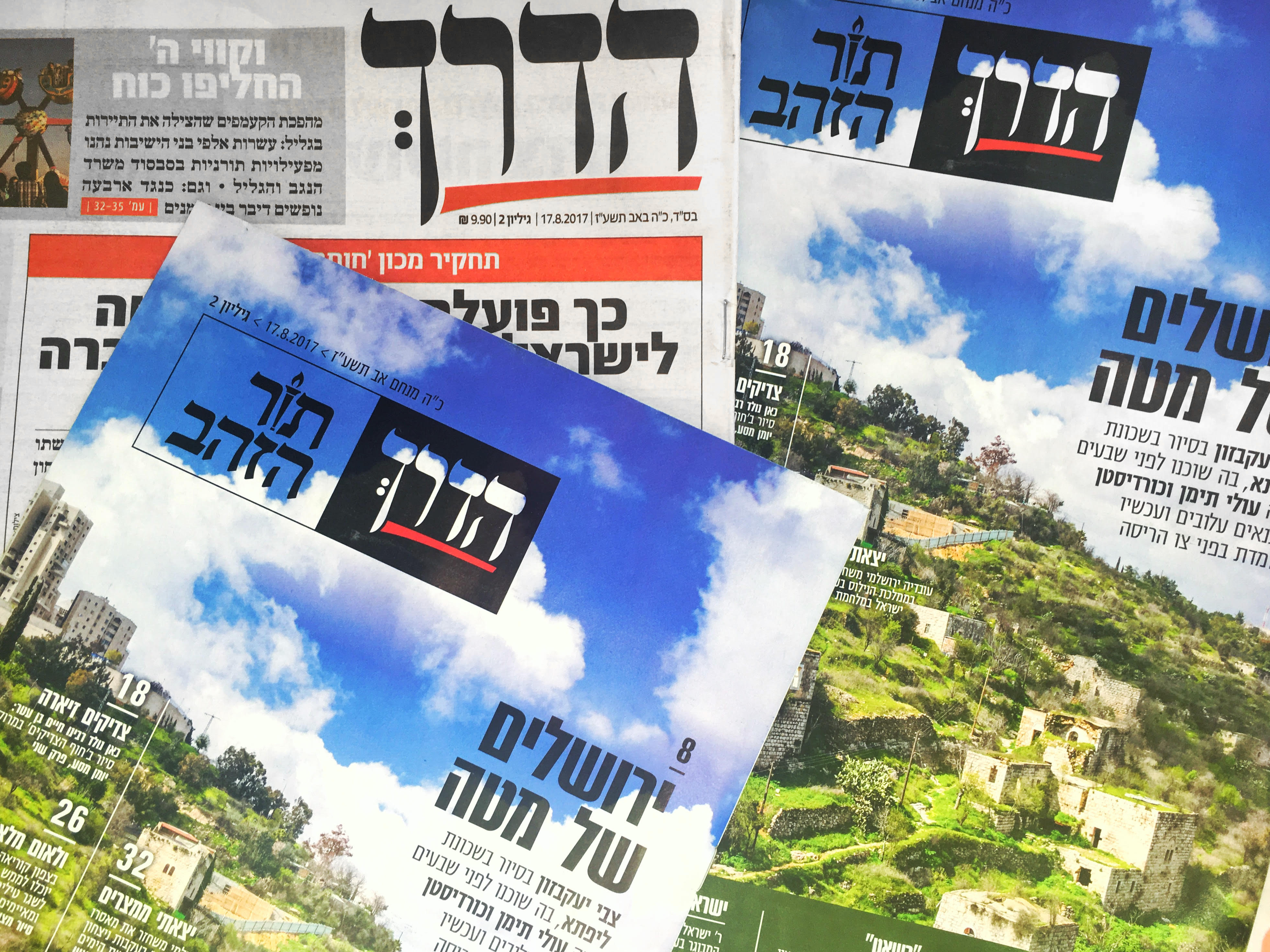 גליון מס' 2 של עיתון הדרך, לצד מגזין העיתון.